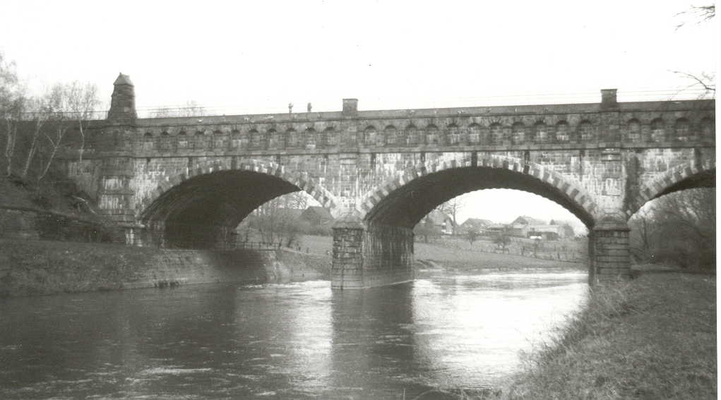 Die Lippebrücke der Alten Fahrt des Dortmund-Ems-Kanals an der Grenze zwischen Olfen und Datteln, eigenes Bild, GNU FDL